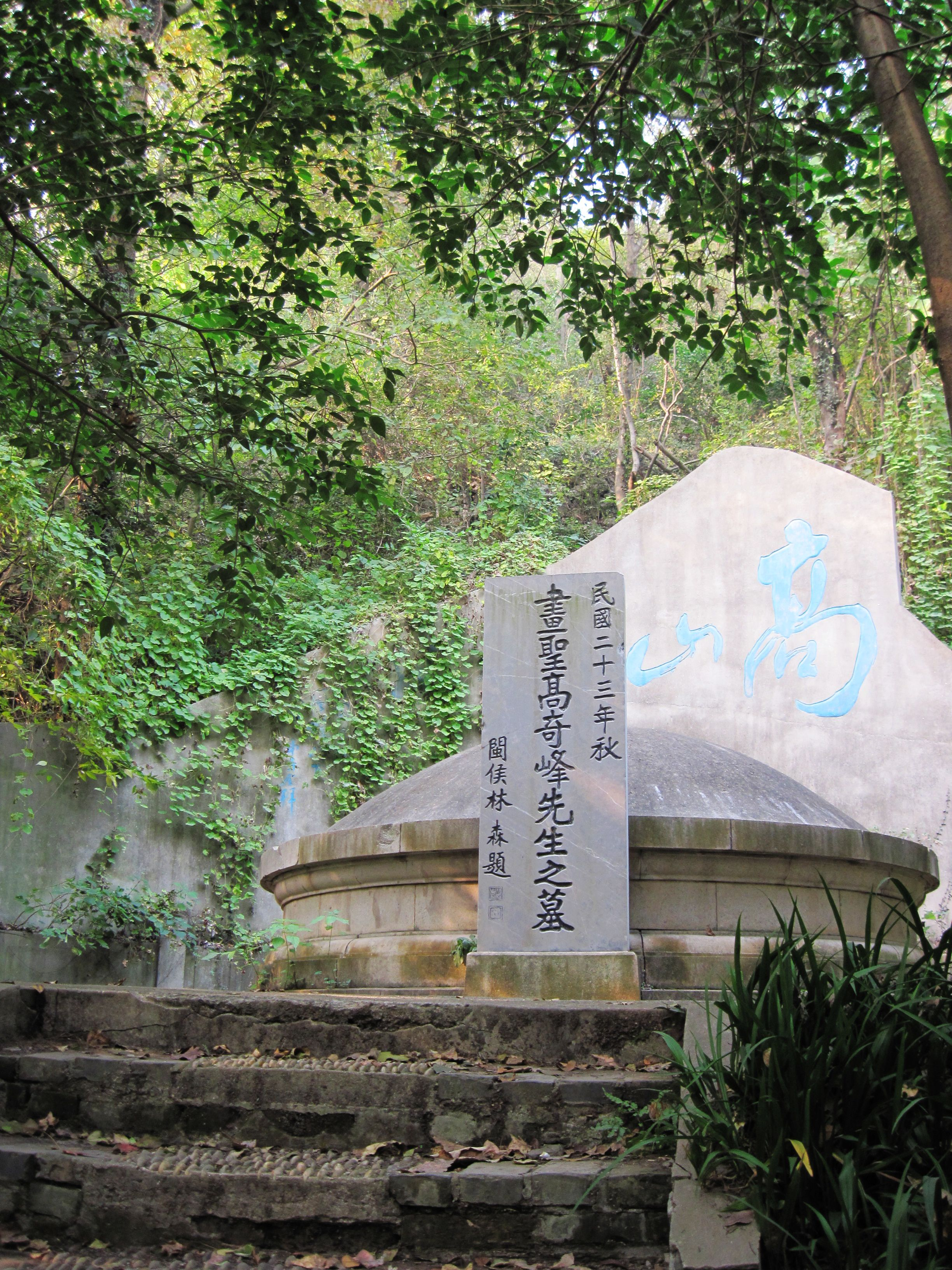 位于栖霞山景区内的高奇峰墓。